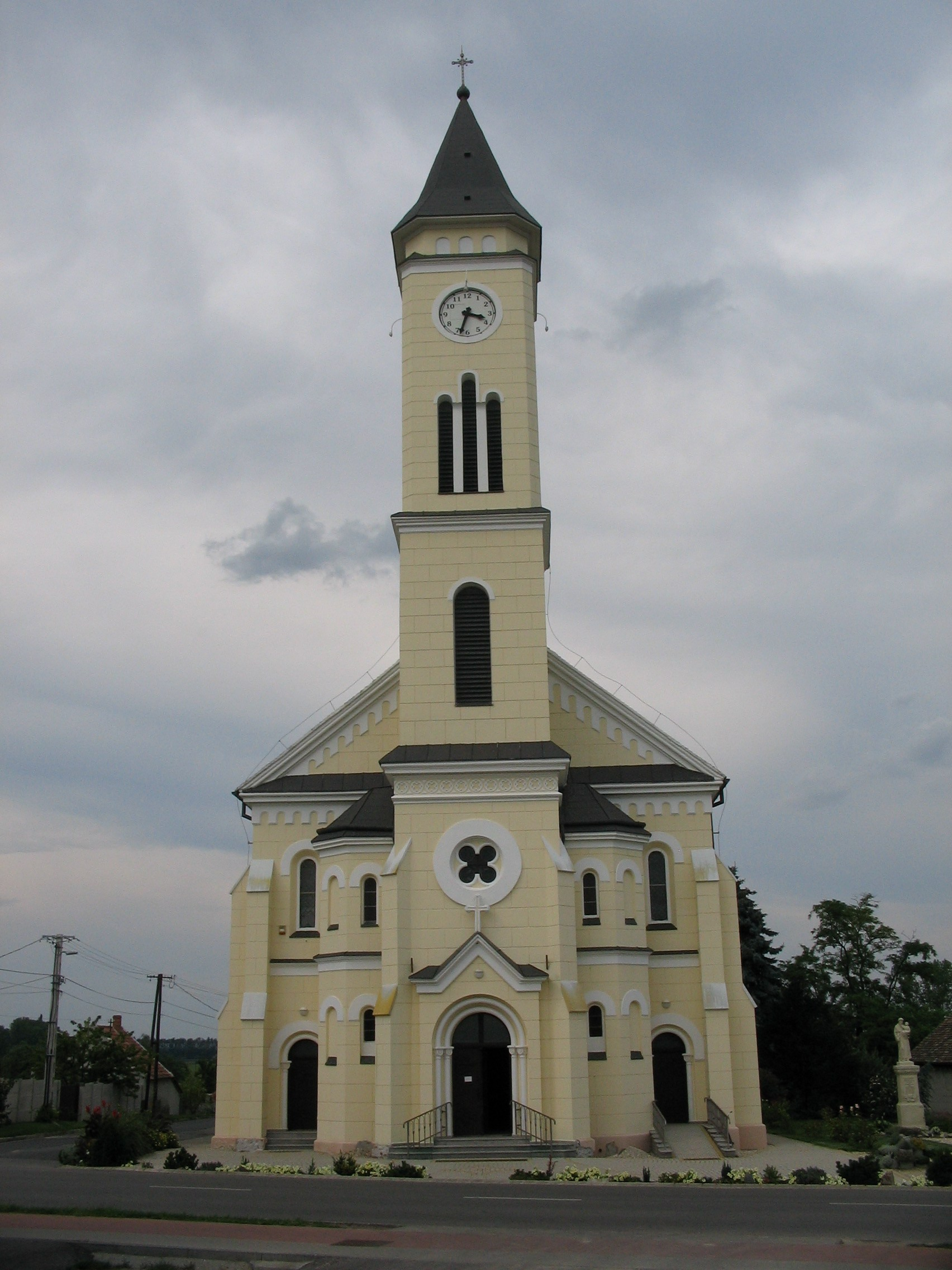 Szent Mihály katolikus plébániatemplom (Hegykő)